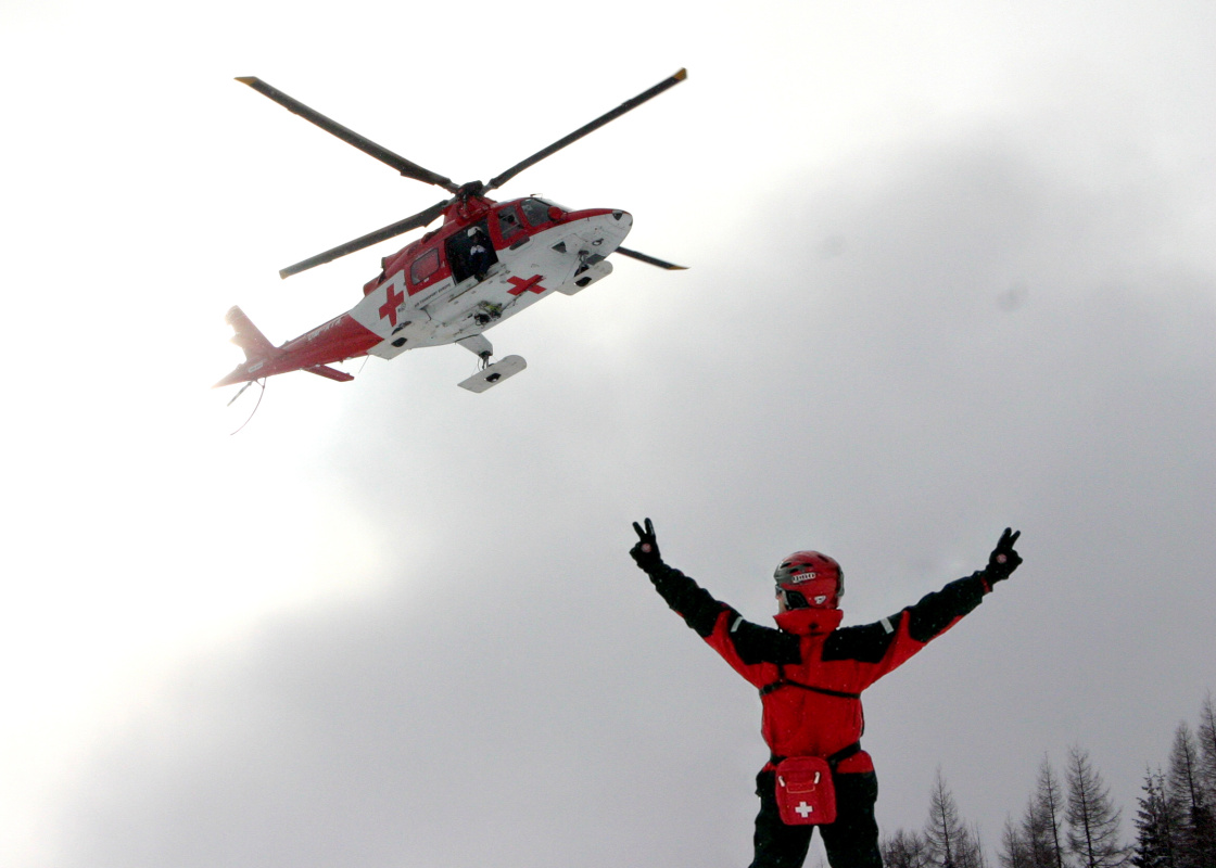 Záchranná akcia - HEMS - Slovakia